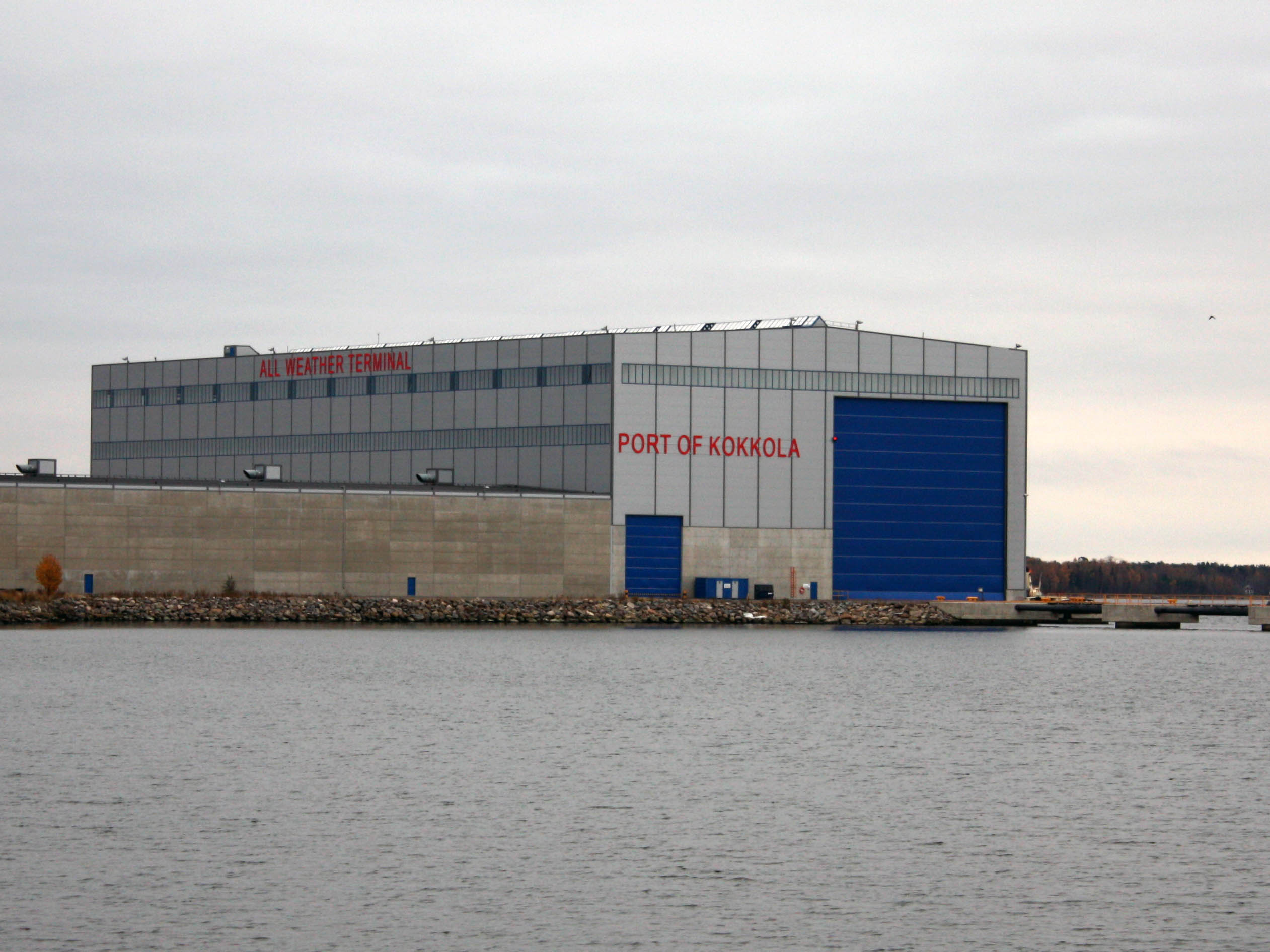 Kokkolan kantasataman, All weather terminal (AWT)